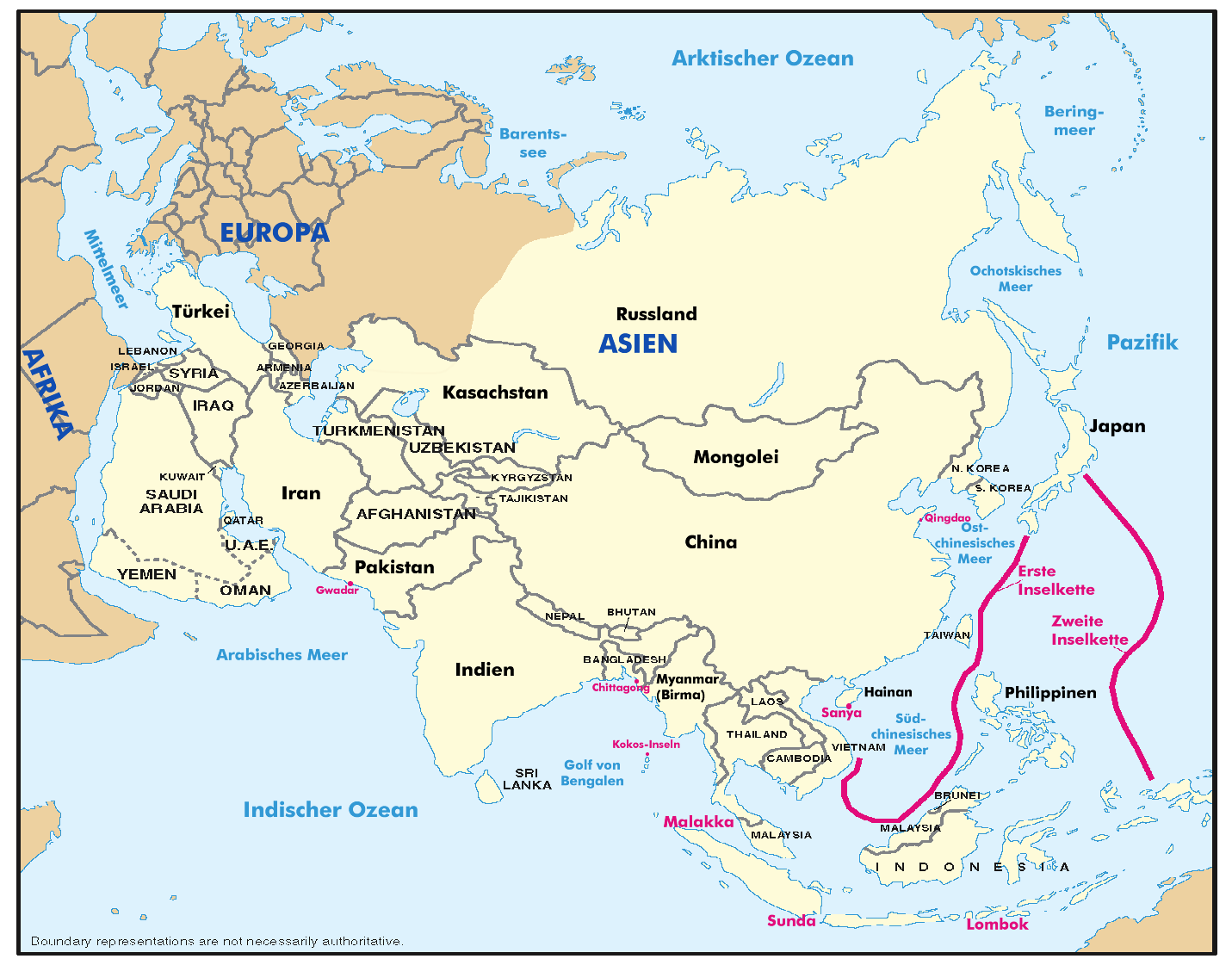 Die intendierte Ausweitung des ständigen Operationsraumes der chinesischen Marine (PLAN) nach Angaben des DoD, mit den für Ostasien wichtigsten Seefahrtsrouten und beispielhaften chinesischen Stützpunkten Anmerkungen: Ländergrenzen möglicherweise nicht geographisch exakt